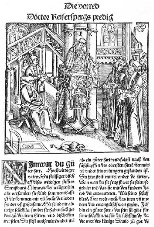 Johann Geiler von Kaysersberg (auch Johannes bzw. in Frankreich Jean)(* 16. März 1445 in Schaffhausen, † 10. März 1510 in Straßburg) gilt als der bedeutendste deutsche Prediger des ausgehenden Mittelalters. Johannes Geiler von Kaysersberg predigt, Holzschnitt aus ‘‘Ein heilsam kostiche Predig Doctor Iohans Geiler von Keisersperg.’’